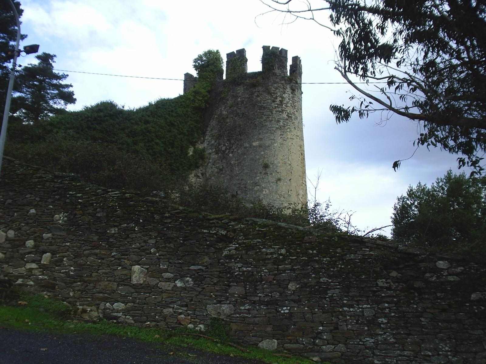 Únicos Restos de la fortaleza de Sarria. La "Torre do Batallón".